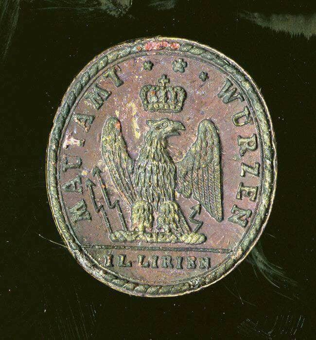 Sachsen, Wurzen